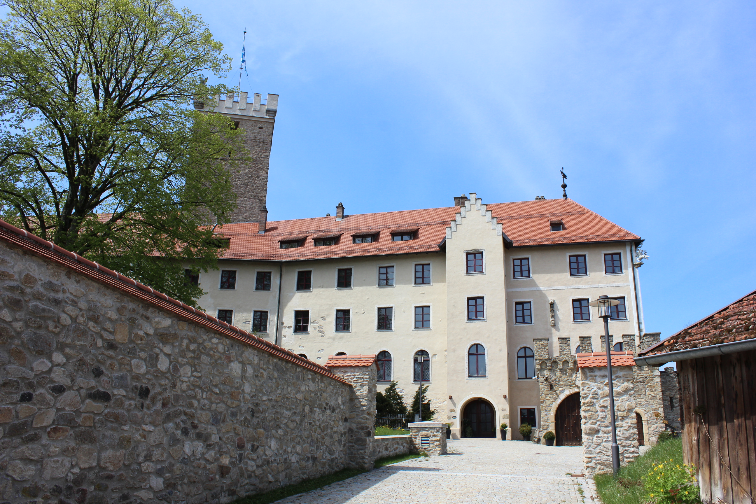 Zufahrtsstraße zur Burg Falkenfels. Die Anlage steht unter Denkmalschutz Nr. D-2-78-120-2.